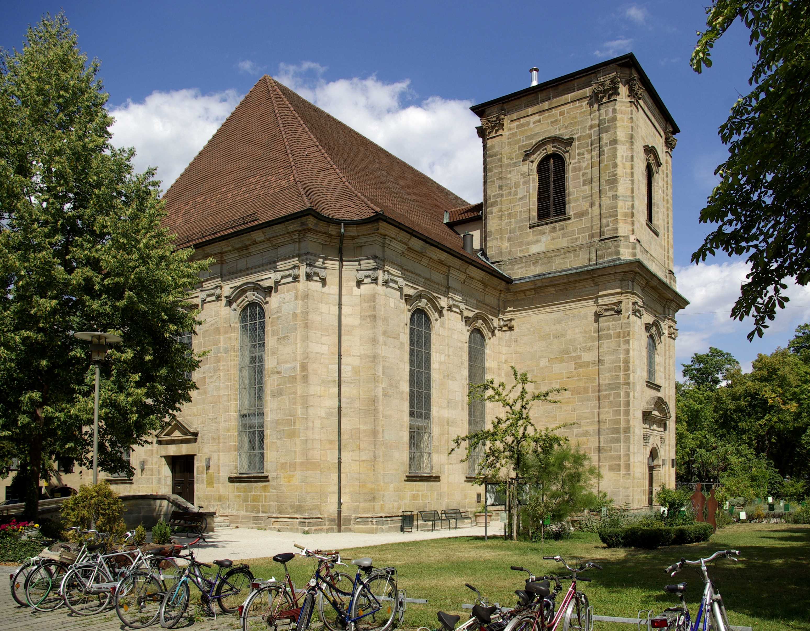 Gemeindehaus am Bohlenplatz in Erlangen. Die von 1728 bis 1734 erbaute, ehemalige Deutsch-reformierte Kirche am heutigen Bohlenplatz 1 galt als elegantester Sakralbau Erlangens. 1922 wurde das Gebäude von der Evangelisch-lutherischen Kirchengemeinde gekauft und in Christuskirche umbenannt. 1953 wurde das Kirchengebäude in ein Gemeindehaus umgebaut, wobei durch den Einbau einer Zwischendecke der ursprüngliche Innenraum zerstört wurde. Die Orgel fand in der 1954 bis 1955 erbauten Markuskirche im Erlanger Stadtdteil Sieglitzhof einen neuen Standort.